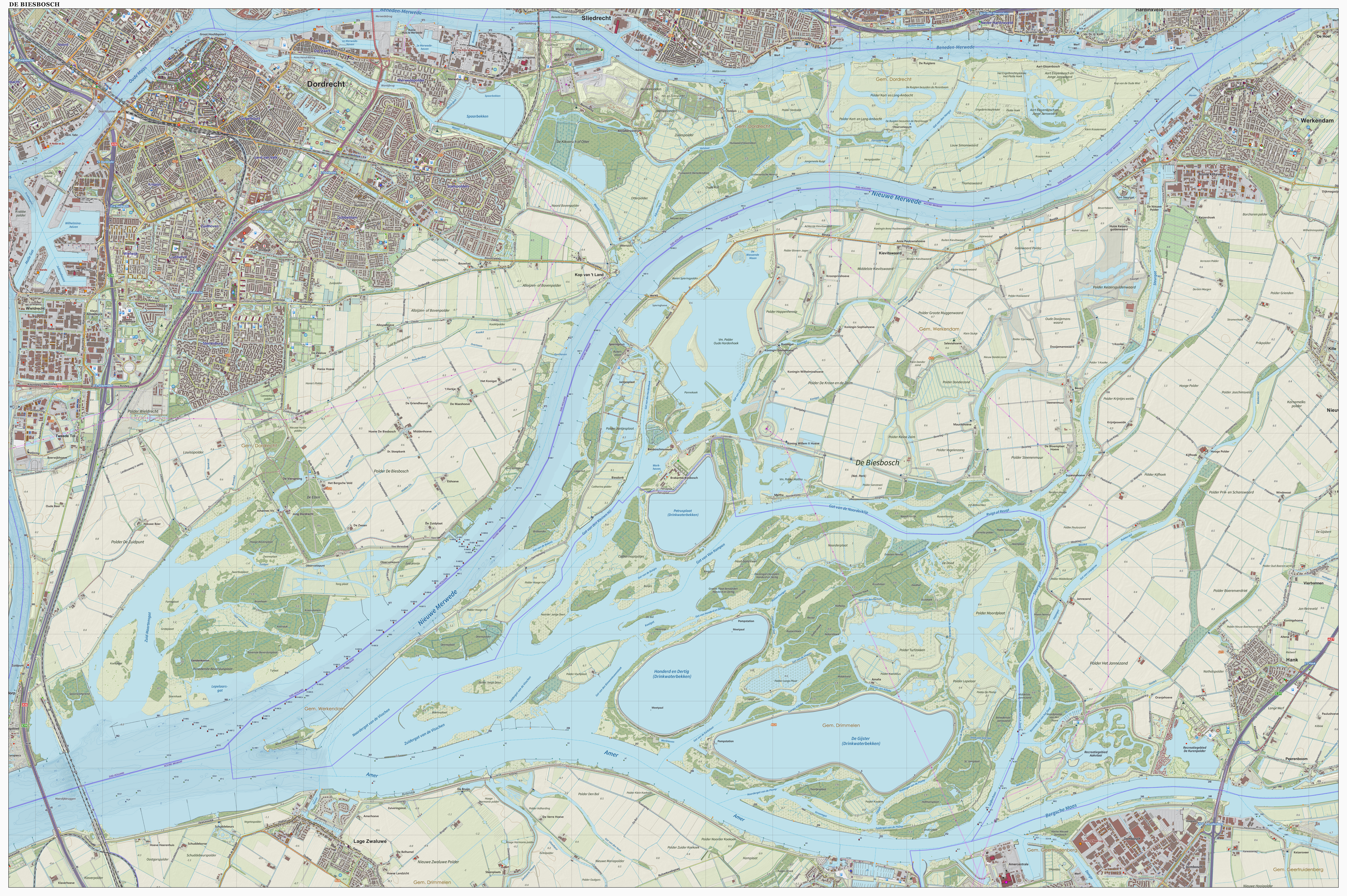 Topografische kaart van De Biesbosch (natuurgebied). Resolutie: 400 pixels/km. Samengesteld door Jan-Willem van Aalst op basis van de GML open geodata van de BRT/Top10NL (basisregistratie Topografie, Kadaster), vrijgegeven door Kadaster onder de Creative Commons BY licentie. Additionele gegevens uit BAG uit de Open Street Map en uit de Risicokaart. Zie ook de Legenda.